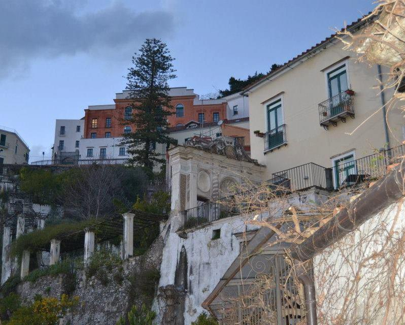 Veduta del Giardino della Minerva e, sullo sfondo, del convento di San Nicola della Palma